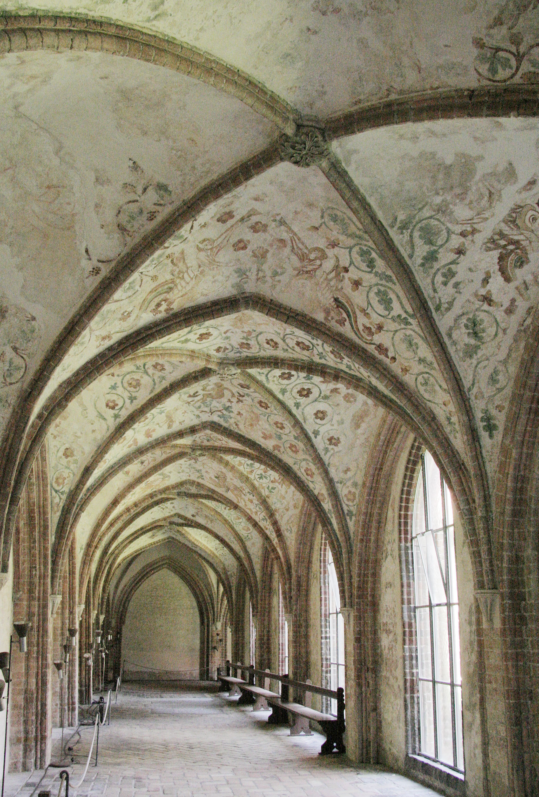 Übersicht der Deckenbemalung im Südflügel des Schwahls